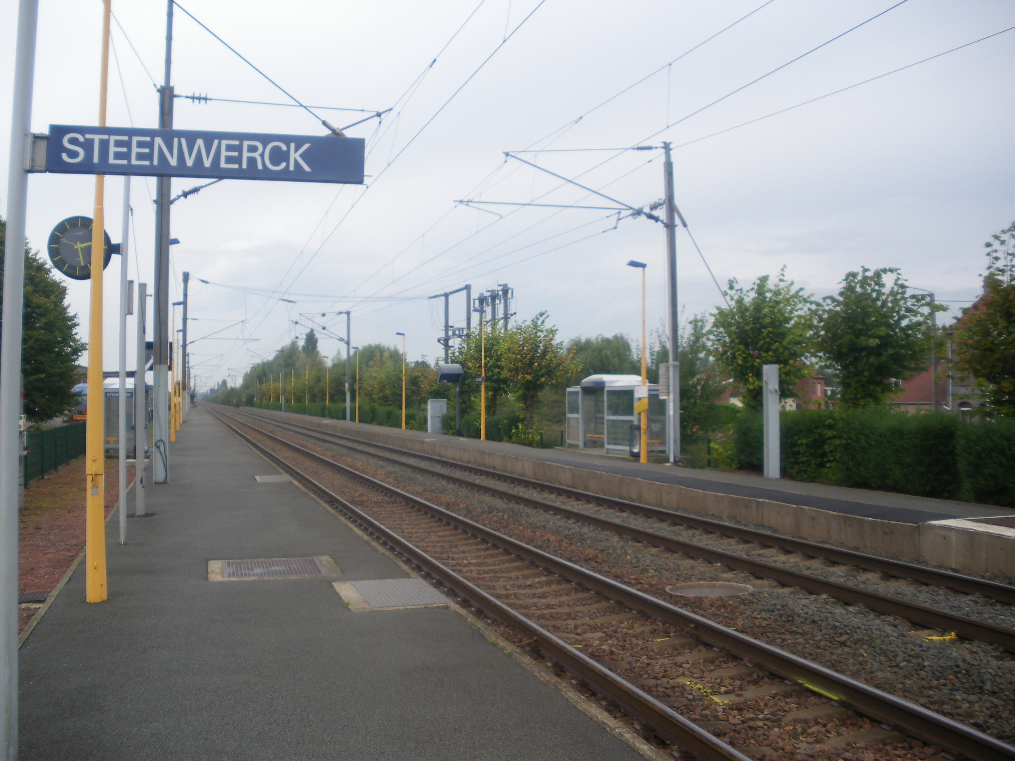 Vue de la gare de Steenwerck.